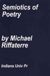 Buku ini membahas secara rinci mengenai penggunaan kajian semiotik Riffaterre. Kajian ini mempermudah orang untuk memahami sebuah puisi